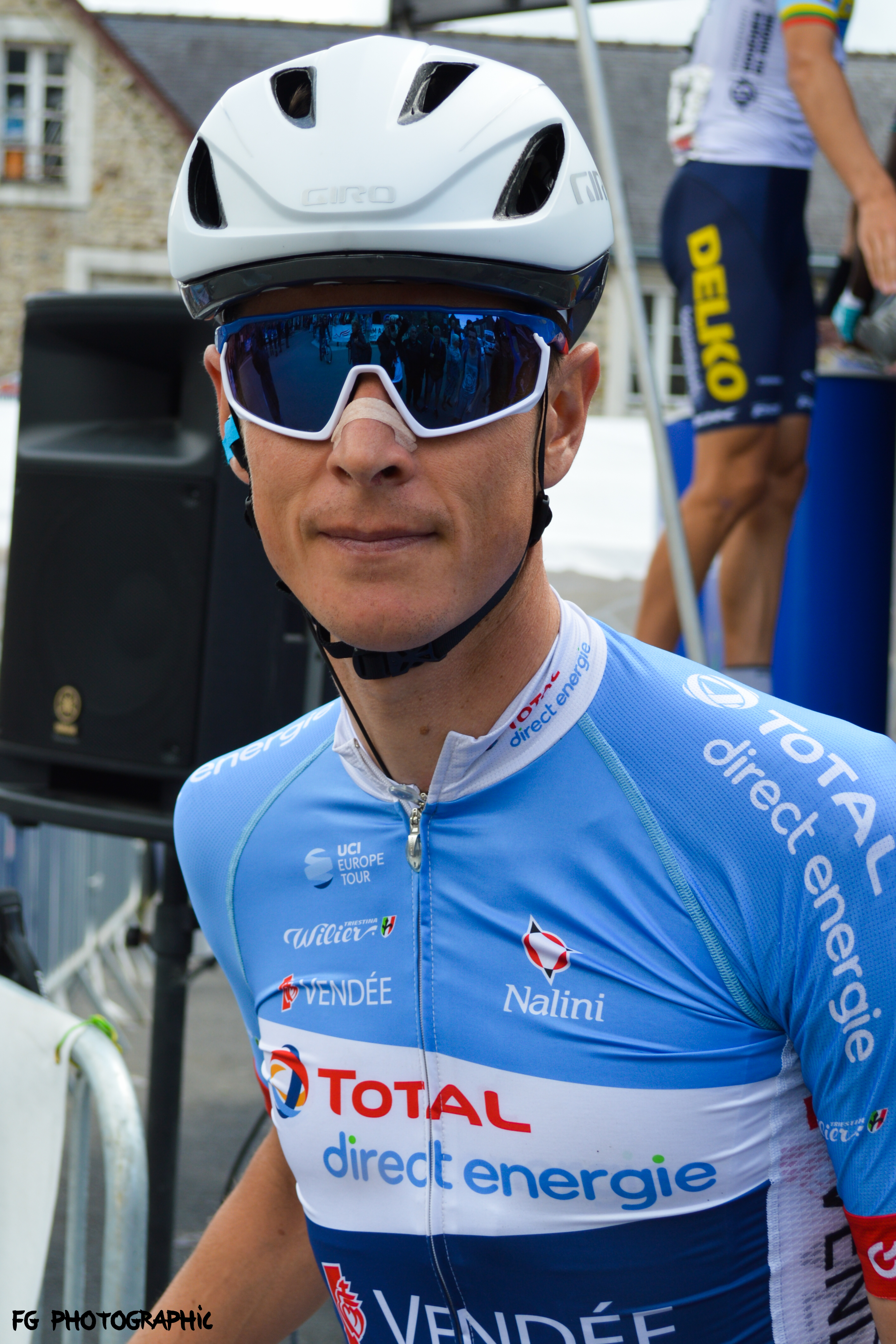 Portrait